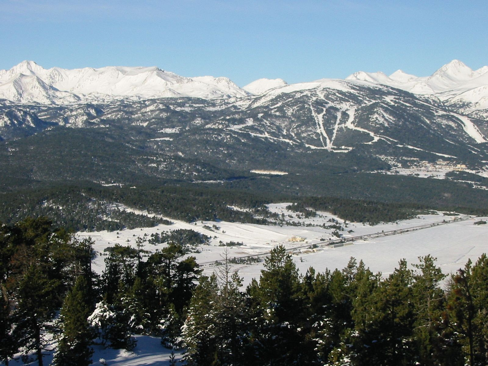 Station de ski de la Quillane vue du polygone de tir, avec au fond les Angles, le Carlit à gauche et le pic Péric à droite, La Llagonne, Pyrénées-Orientales, France